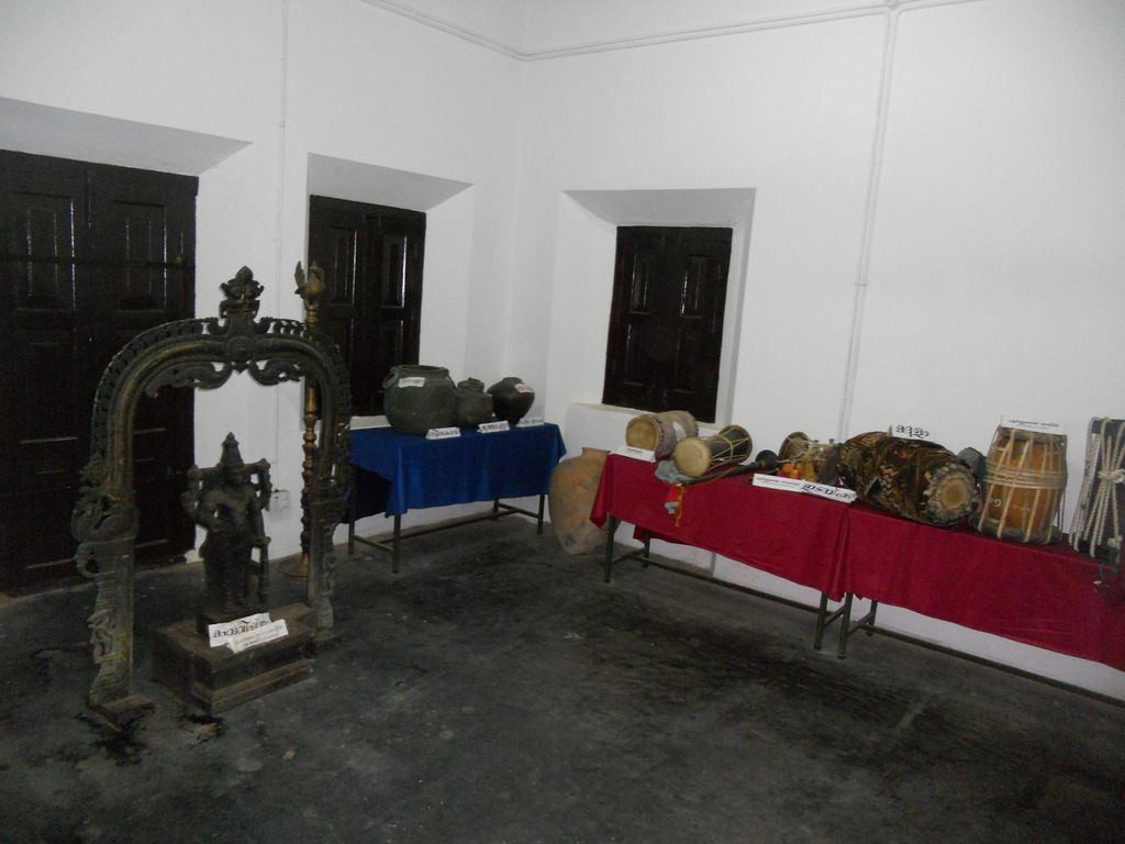 കൊട്ടാരക്കരത്തമ്പുരാൻ സ്മാരക ക്ലാസിക്കൽ കലാ മ്യൂസിയത്തിലെ പ്രദര്‍ശന വസ്തുക്കള്‍